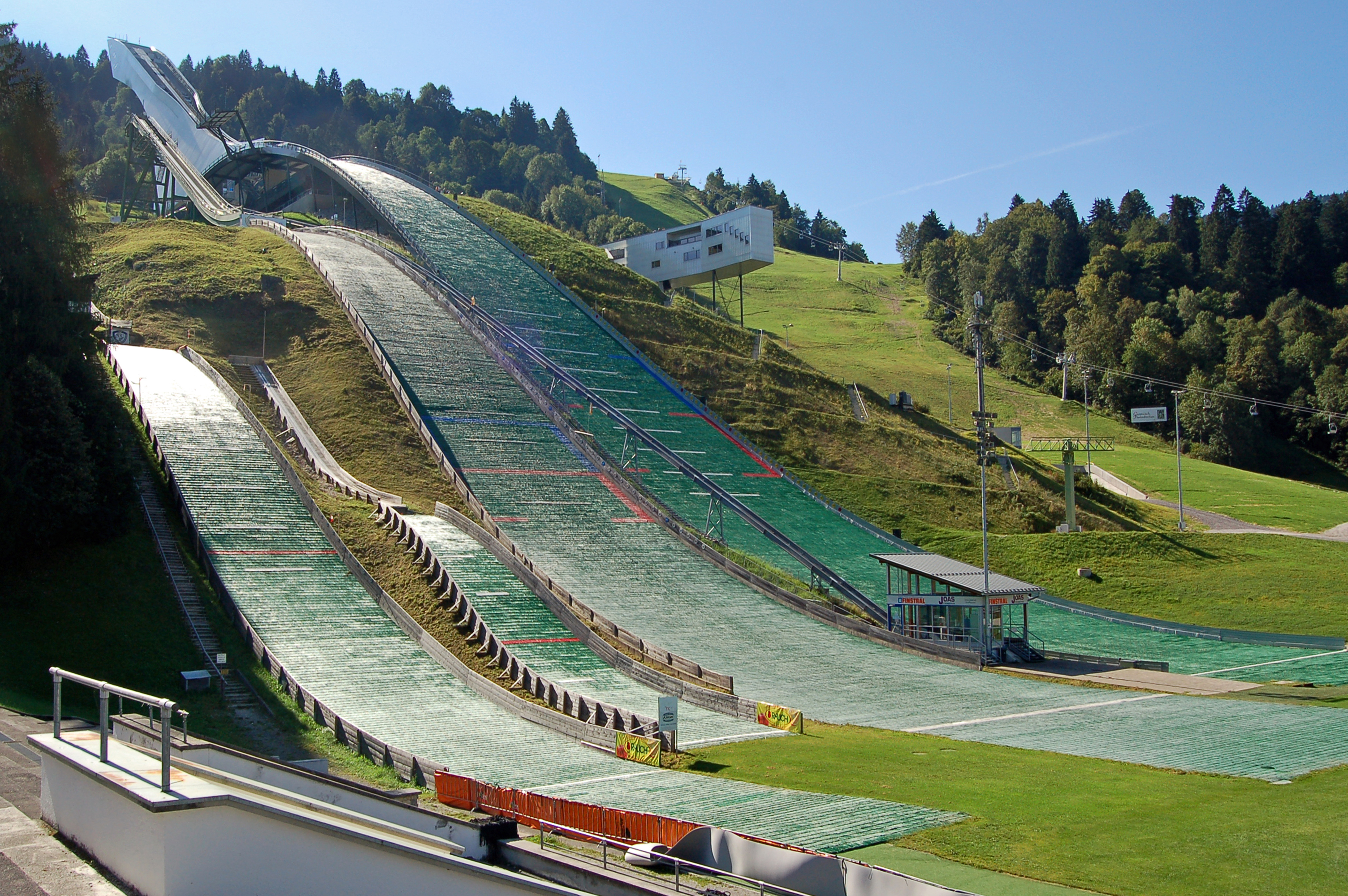 Bereits 1923 entstand die erste Olympia-Schanze am Gudiberg. Und das, obwohl die Olympischen Winterspiele dem Ort erst für 1936 zugesprochen wurden. Weil die steilen Hänge des Berges für das Anlaufprofil nicht ausreichten, wurde ein künstlicher Anlaufturm von 43 Metern Höhe und 5 Metern Breite errichtet. Im Laufe der Jahre wurde die Schanze immer wieder modernisiert. 2007 wich sie dann einem komplett neuen Bau mit einem Anlaufturm von 100 Metern Länge. Oben angelangt, befindet man sich heute freischwebend, 62 Meter über dem Gelände, was der Anlage den Spitznamen »Olympischer Freischwinger« eintrug. Im Winter verschmilzt die neue Schanze tagsüber dank ihrer transluzenten Verkleidung mit der sie umgebenden Schneelandschaft. Abends wird der von innen erleuchtete Anlaufturm zur faszinierenden Lichtskulptur. Das neue Wahrzeichen wurde schon mit dem BDA-Preis Bayern vom Bund Deutscher Architekten und dem IOC/IAKS-Award ausgezeichnet.